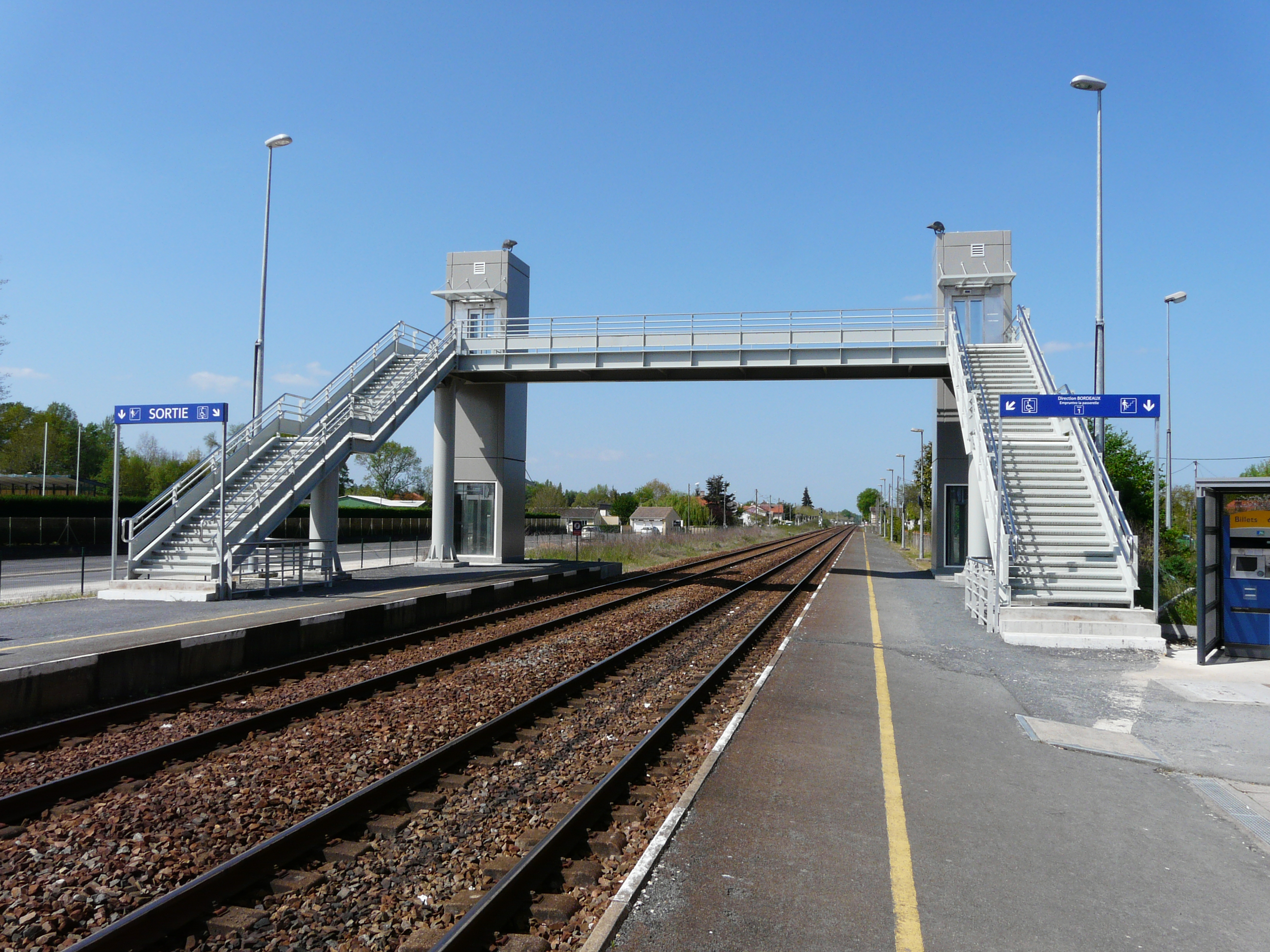 Les voies en gare de Montpon-Ménestérol, Dordogne, France. Vue prise en direction de Bordeaux.